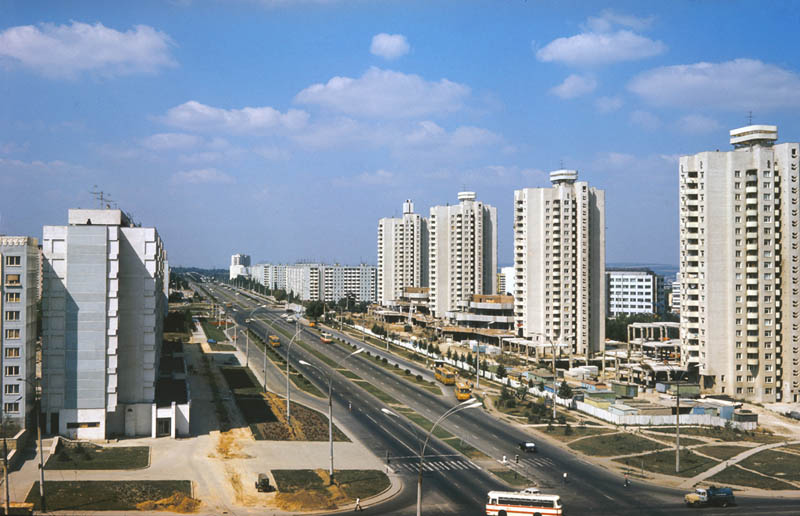 "Orasul meu cu umeri albi de piatra, In ploi de soare zi de zi scaldat, Cu ani cinci sute asezati la vatra Trecutul glorios si zbuciumat". (Word Gheorghe Voda).